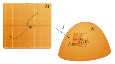 Immagine di una curva tramite una mappa su varietà